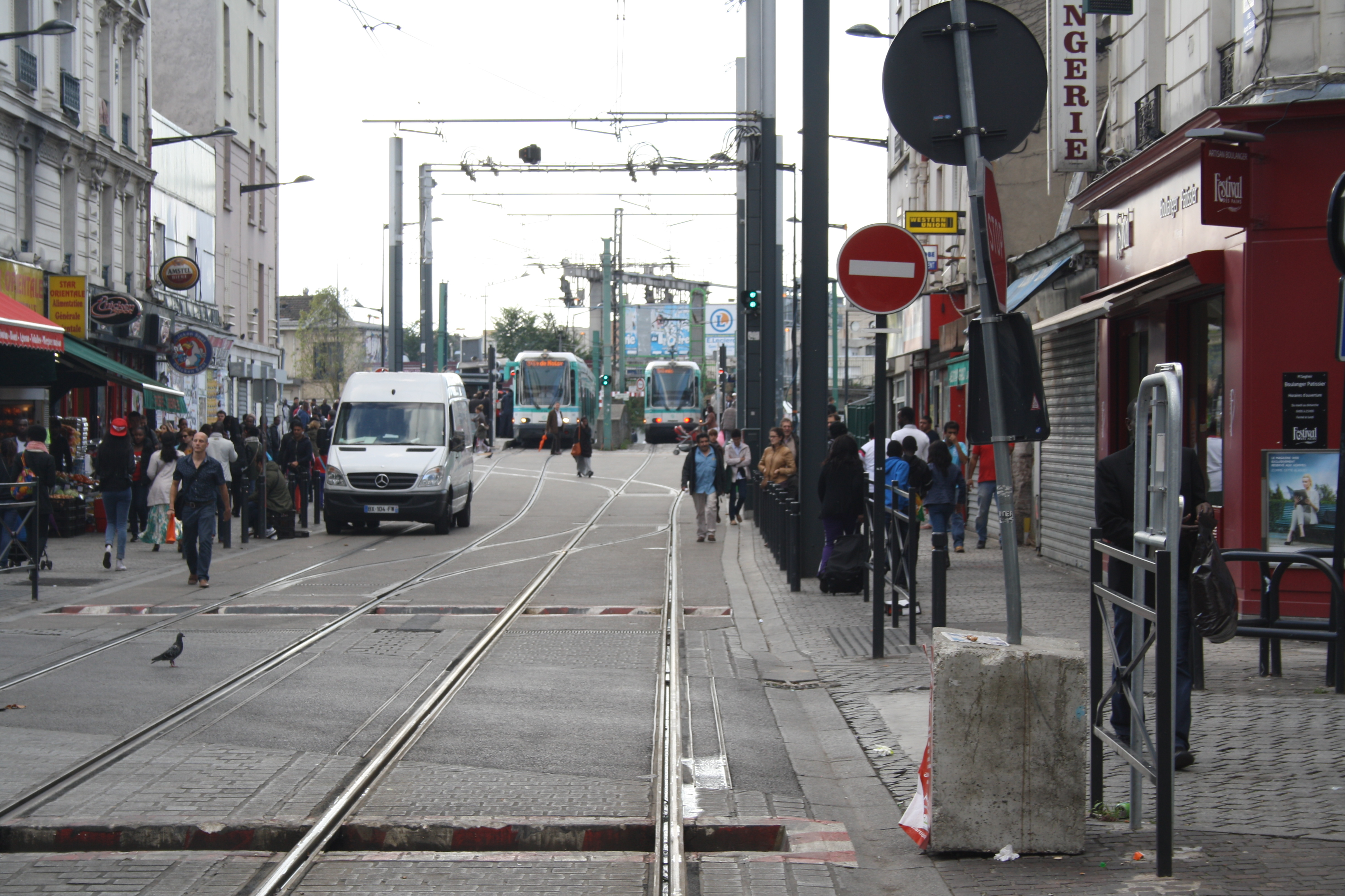 Tram Linie 1 in Saint-Denis, rue Auguste Delaune